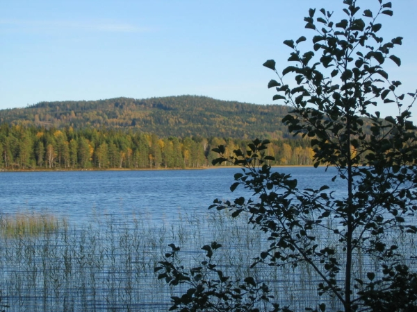 Vy mot Gårdvikaberget, Grängen okt 2010.